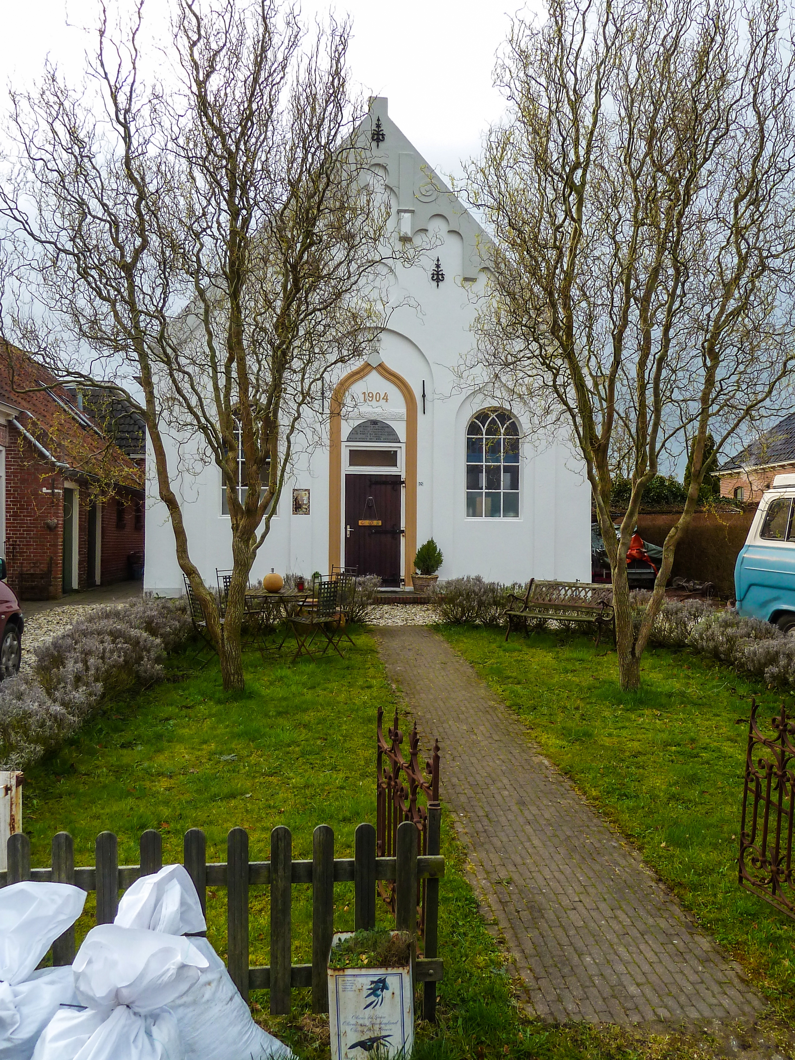 Voormalige doopsgezinde kerk Zeerijp.